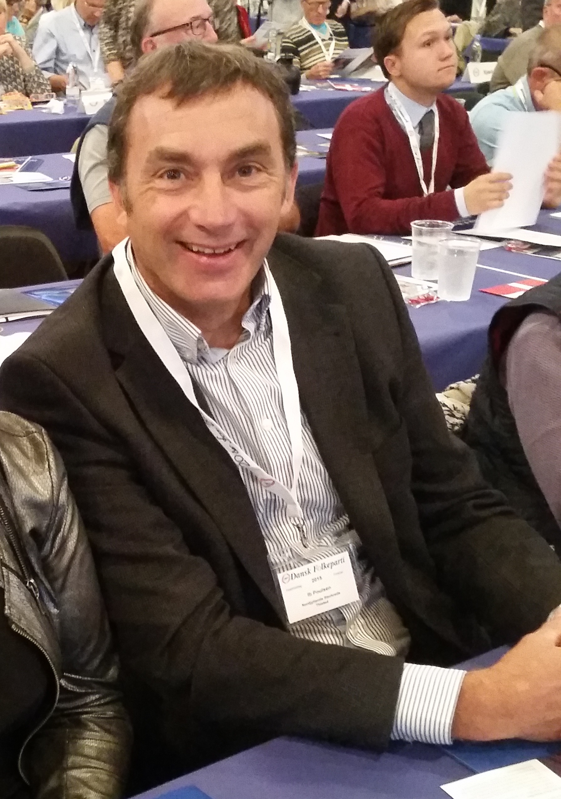 Ib Poulsen til Dansk Folkepartis årsmøde 2015